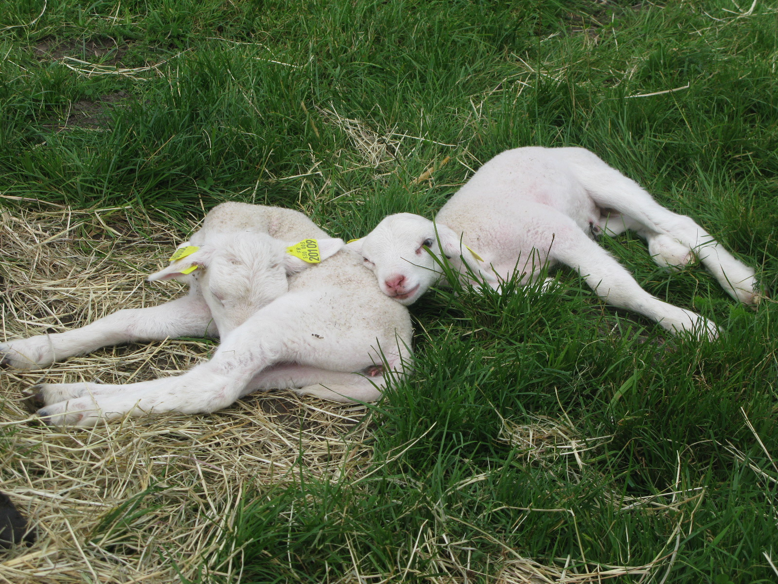 Agneaux (ovis aries) de race romane INRA 401, bergerie nationale de Rambouillet.